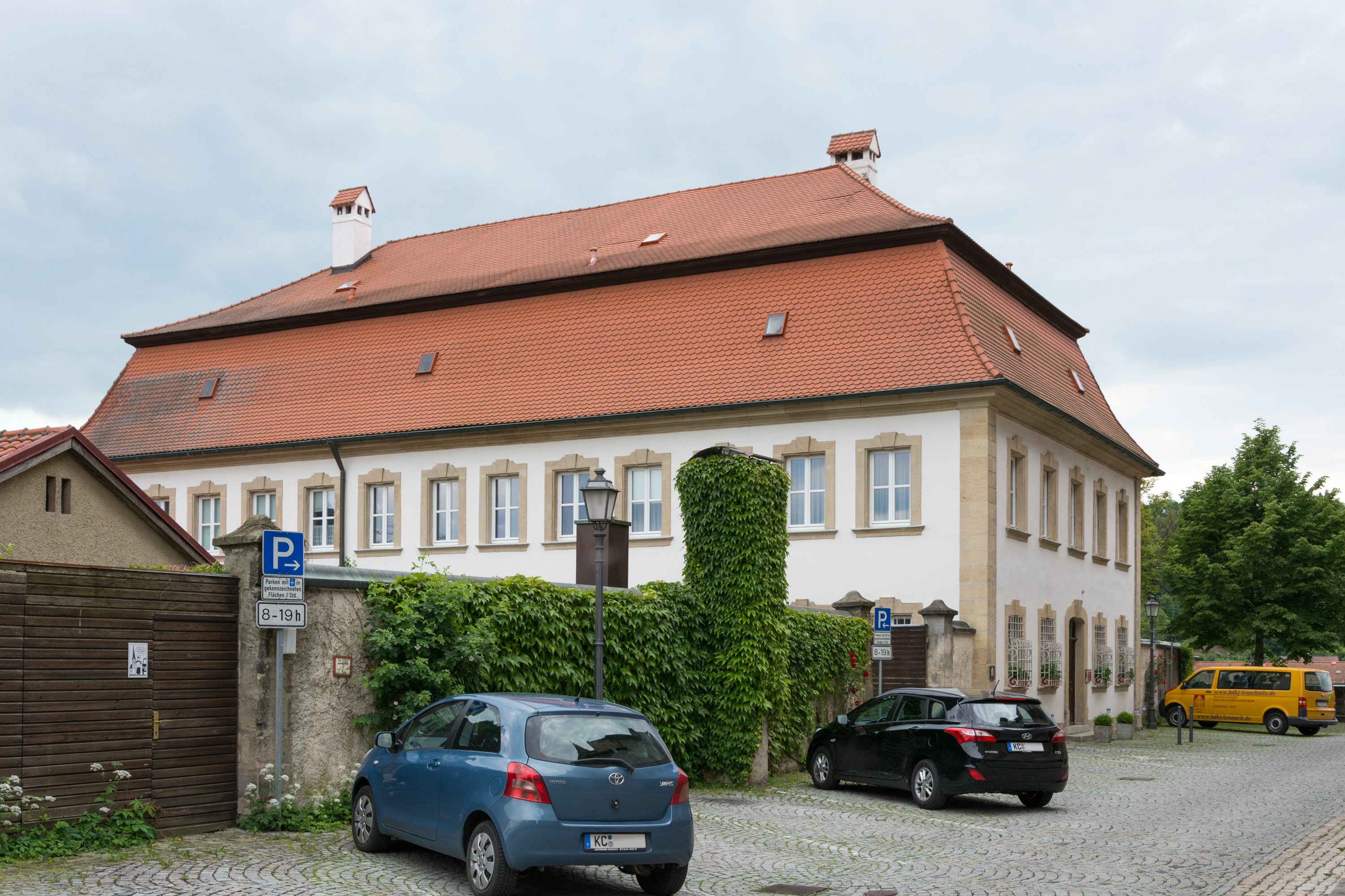 Gebäude Melchior-Otto-Platz 9 in Kronach, katholisches Pfarrhaus.